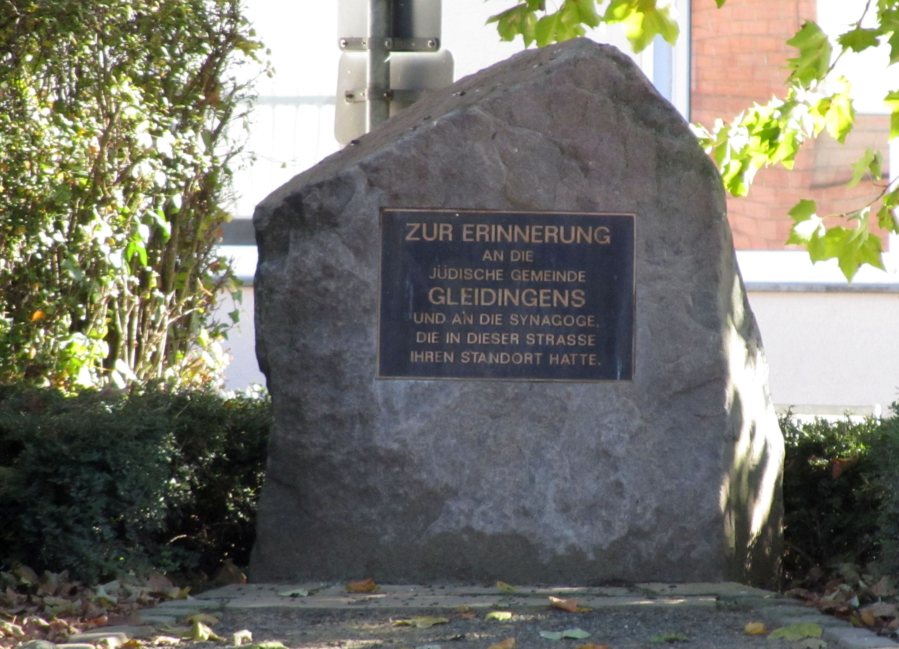 In Gleidingen gab es vor dem Krieg eine große jüdische Gemeinde, deren Mitglieder gut in das Gleidinger Gemeindeleben als Händler und Kaufleute integriert waren. Es gab eine Synagoge mit Leichenwagenhalle, ein Badehaus und einen jüdischen Friedhof, der bis heute existiert. An diese lebendige jüdische Gemeinde Gleidingens und die Synagoge in der Thorstrasse erinnert der Stein an der Gedenkstätte. Alljährlich am 9. November, dem Jahrestag der Pogromnacht, legt der Bürgermeister der Stadt Laatzen zur Erinnerung an die jüdischen Opfer des Nationalsozialismus einen Kranz an der Gedenkstätte nieder.